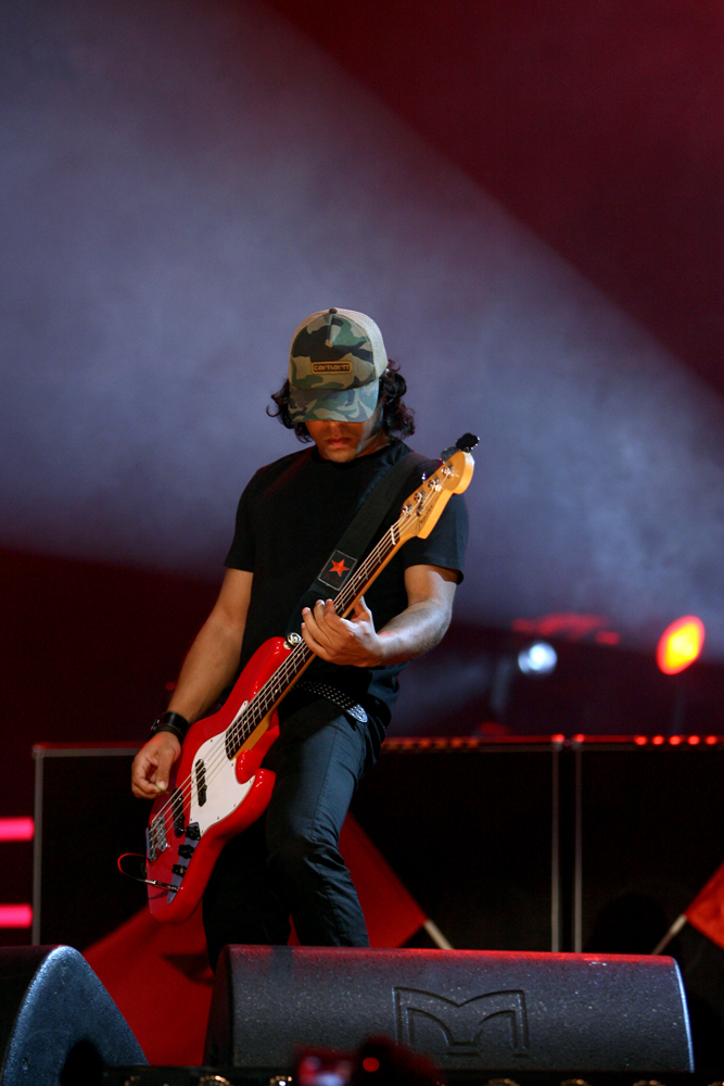 Jay. Concerto no Pavilhão Atlântico dos Da Weasel. 10 de Novembro 2007